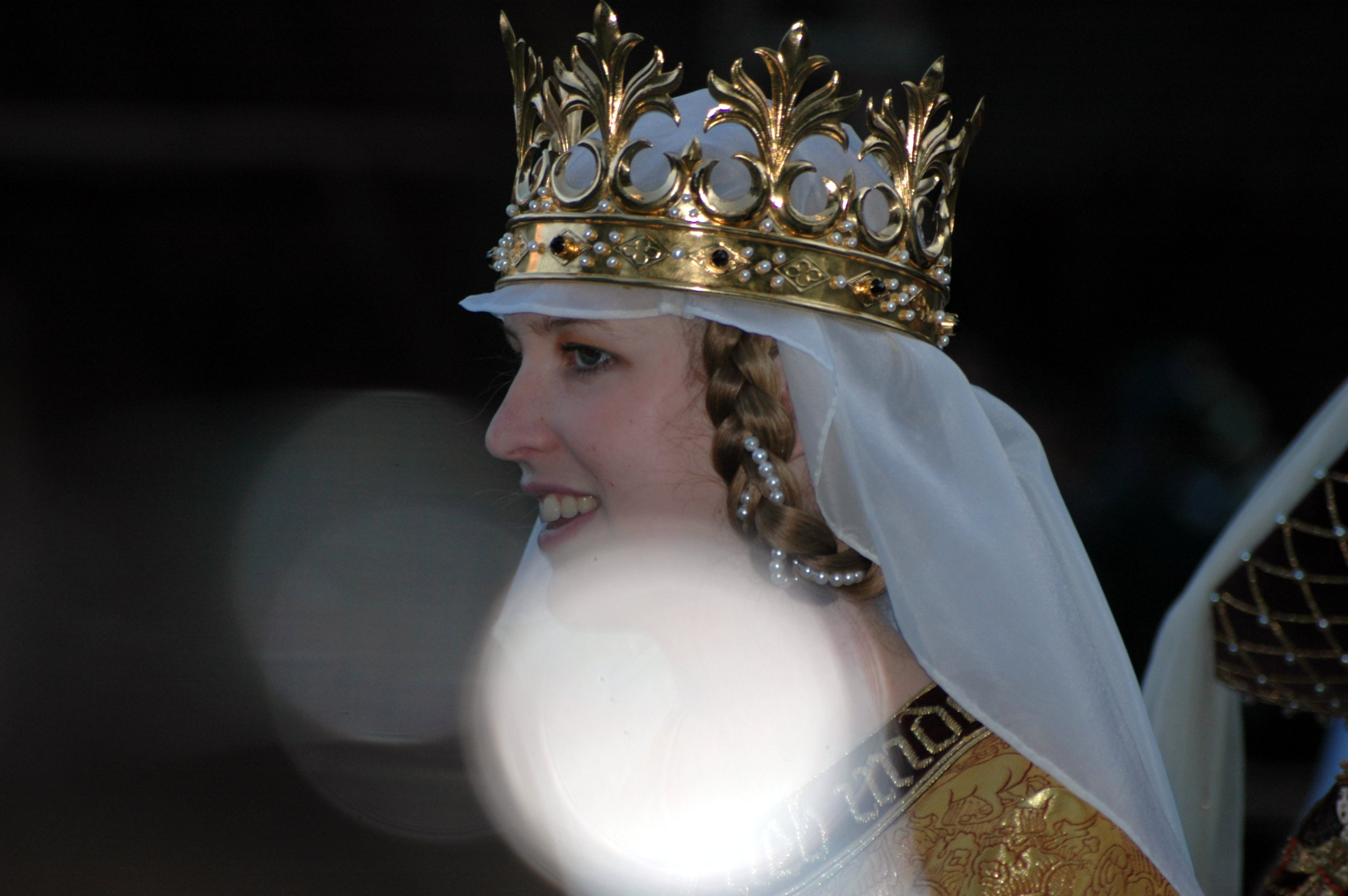 Braut der Landshuter Hochzeit 1475 (Aufführung 2005)